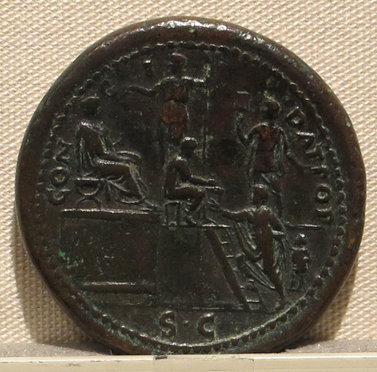 Palazzo Massimo alle Terme